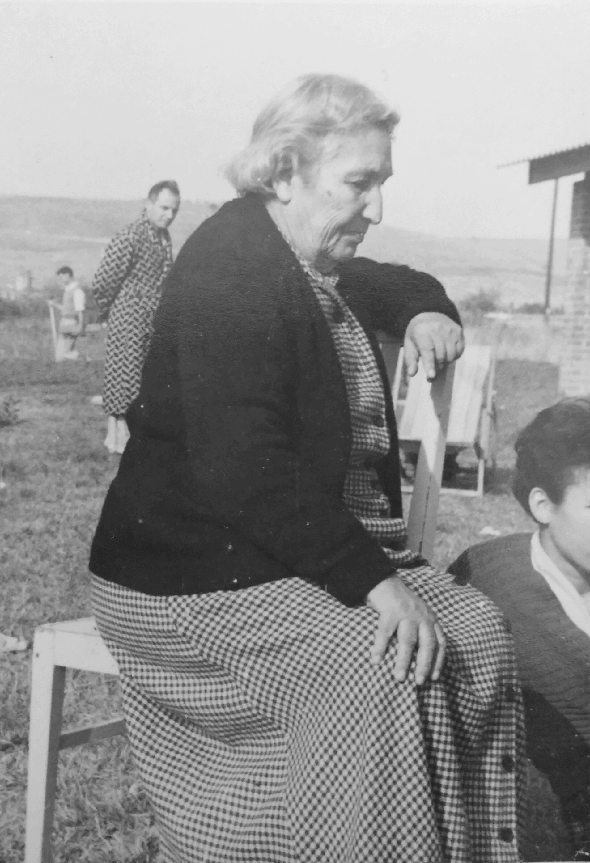 שרה עזריהו 1956